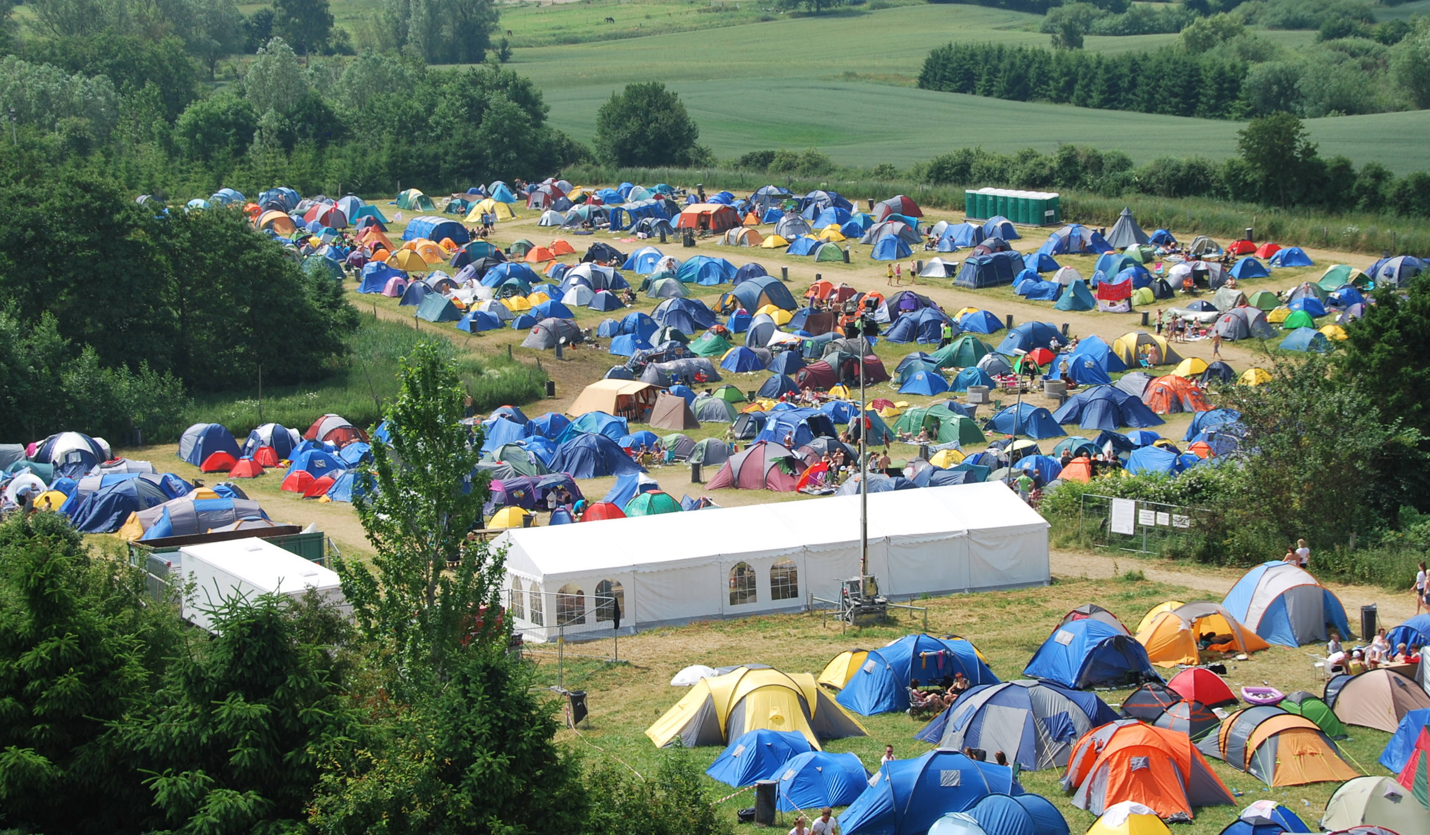 Campingområde på Vig Festival 2010.